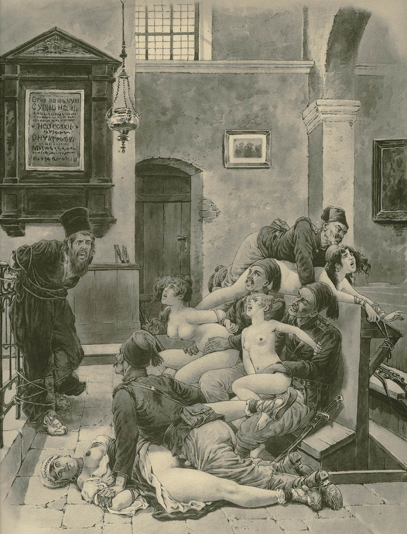 Balkangreuel